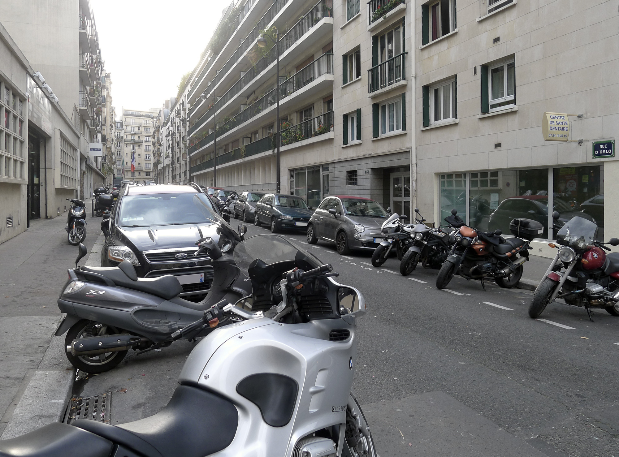 Rue d'Oslo - Paris XVIII